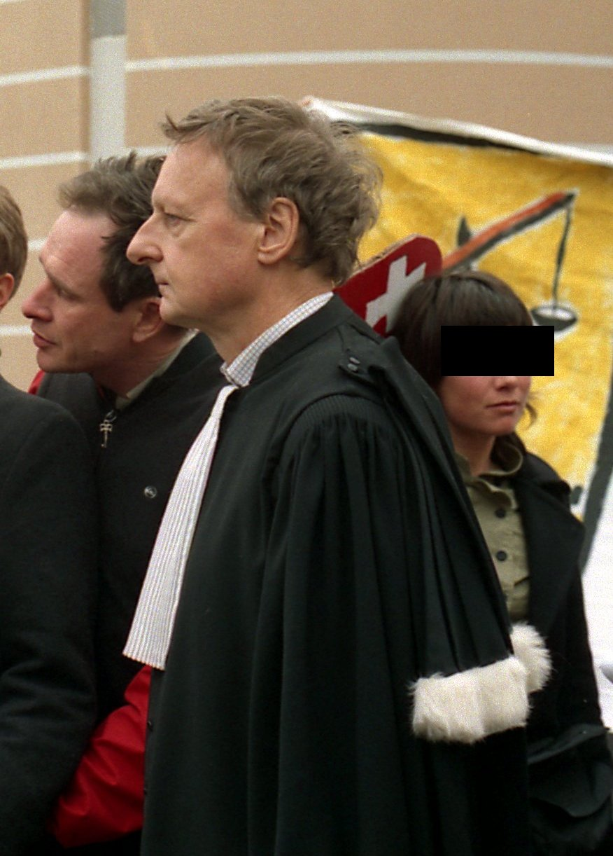 Maître Garbade, avocat des parties civiles au procès en appel de l'affaire du pont de l'Aubonne, Nyon, 17 février 2006, après le rendu du verdict